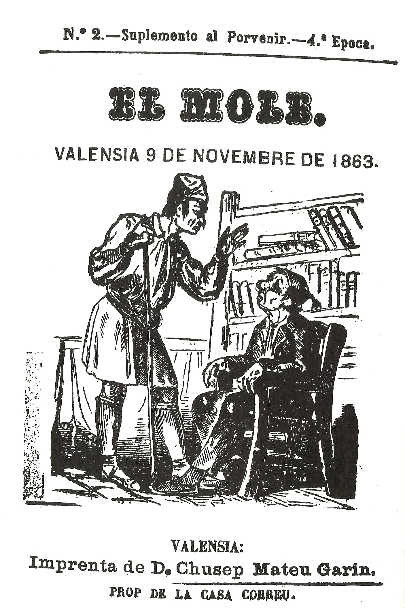 Portada d'El Mole corresponent a l'any 1863 (4a època).